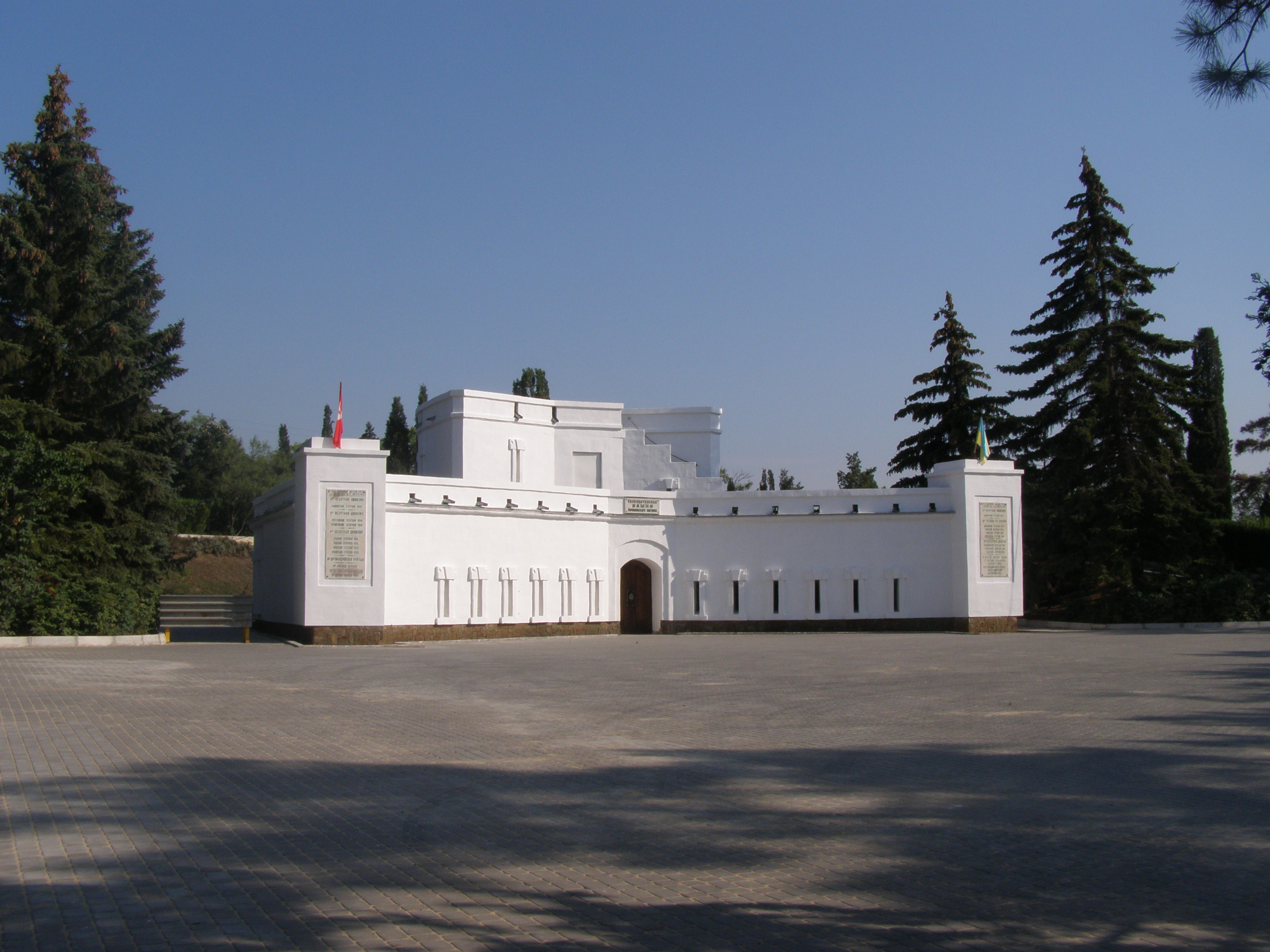 Меморіальний комплекс пам'яток оборони міста в 1854 - 1855 роках, 1941 - 1944 роках "Малахів курган", Севастополь, Малахів курган